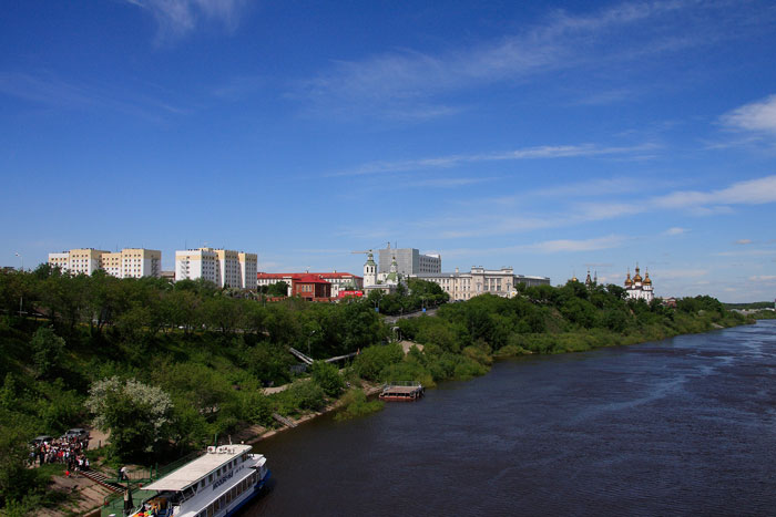 Вид на реку Тура в Тюмени